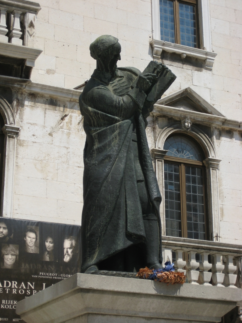 Spomenik Marku Maruliću u Splitu. Svečano otkrivanje spomenika bilo je 26. srpnja 1925. godine, povodom otvorenja željezničke pruge Zagreb-Split i održavanja velike Jadranske izložbe. Na postamentu je s prednje strane kipar Ivan Meštrović uklesao: Marko Marulić 1450.-1524., a sa stražnje: Ivan Meštrović svoje djelo poklonio. Ploču su 1942. godine čekićima razmrskali talijanski fašisti.